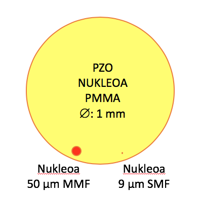 PZO nukleo ertainaren konparaketa beirazko zuntz moduanitzen nukleoarekin eta modubakarren nukleoarekin.